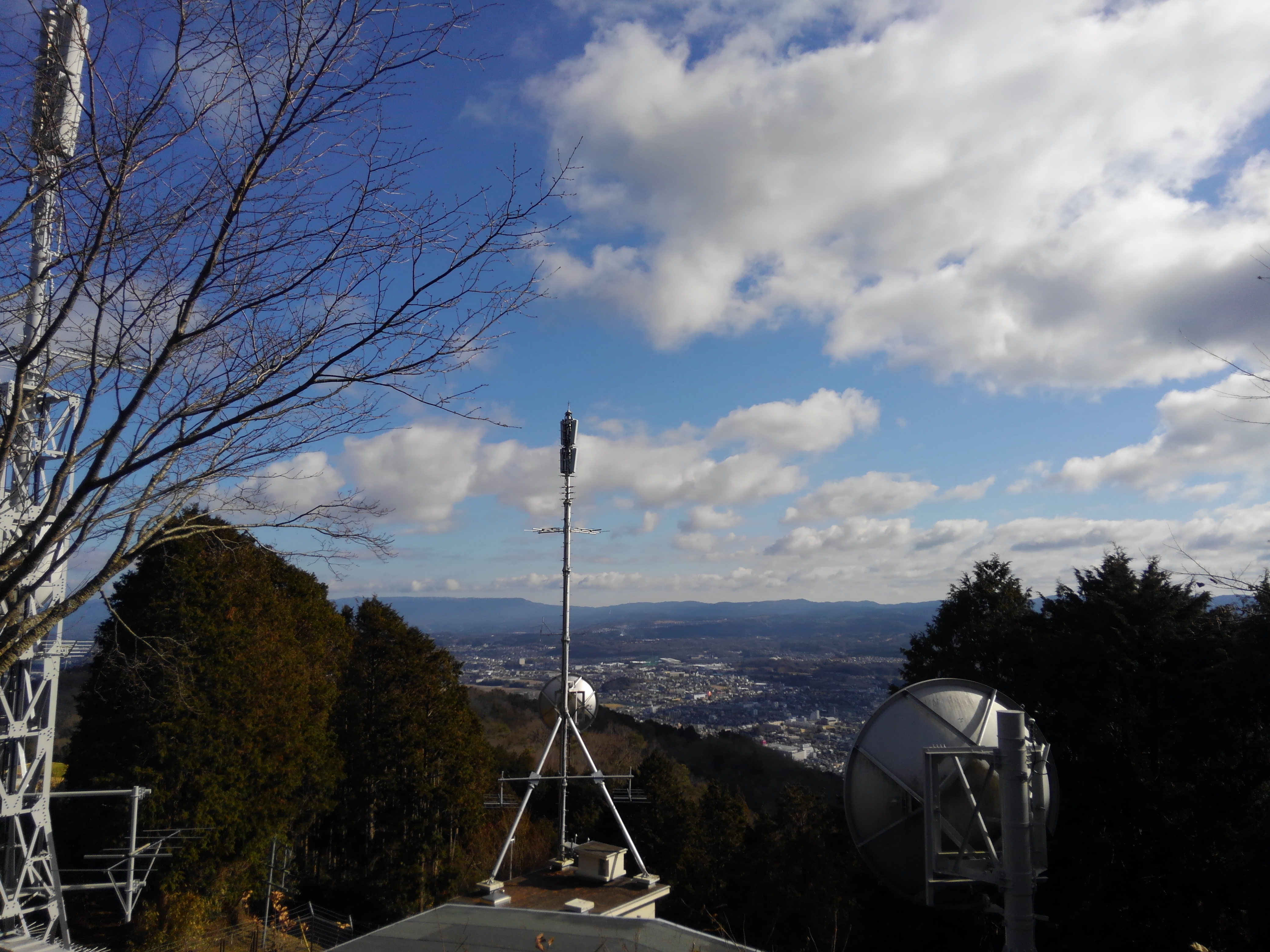 茶臼山 (奈良県・三重県)山頂付近から名張市への眺め。手前には中継局のアンテナも見えている。 2019年1月14日10時26分撮影